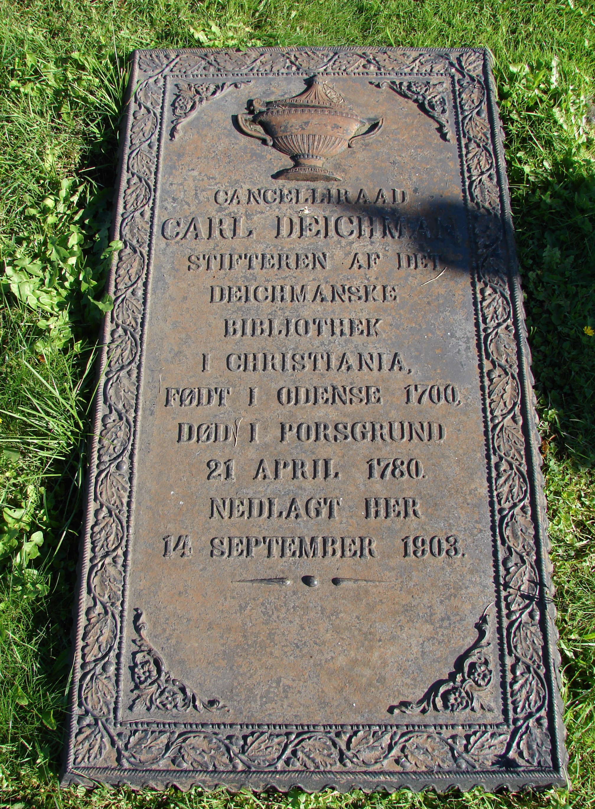 Cancelliraad, Carl Deichman, Stifteren af Det Deichmanske Bibliothek, i Christiania, født i Odense 1700, død i Porsgrund, 21 April 1780. Nedlagt her 14, September 1903. Gravminde på Østre Porsgrund Kirkegård, Porsgrunn, Telemarken